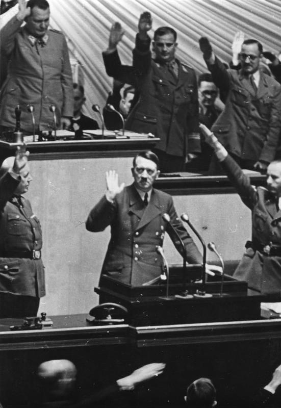 Berlin, Reichstagssitzung, Rede Adolf Hitler Die welthistorische Sitzung des Grossdeutschen Reichstags am 11. Dezember 1941. Immer wieder muss der Führer dem ihn entgegen brandenden Jubel des ganzen Hauses danken. [Berlin, Kroll-Oper.- Adolf Hitler vor dem Reichstag.- Rede zur Kriegserklärung an die Vereinigten Staaten von Amerika]